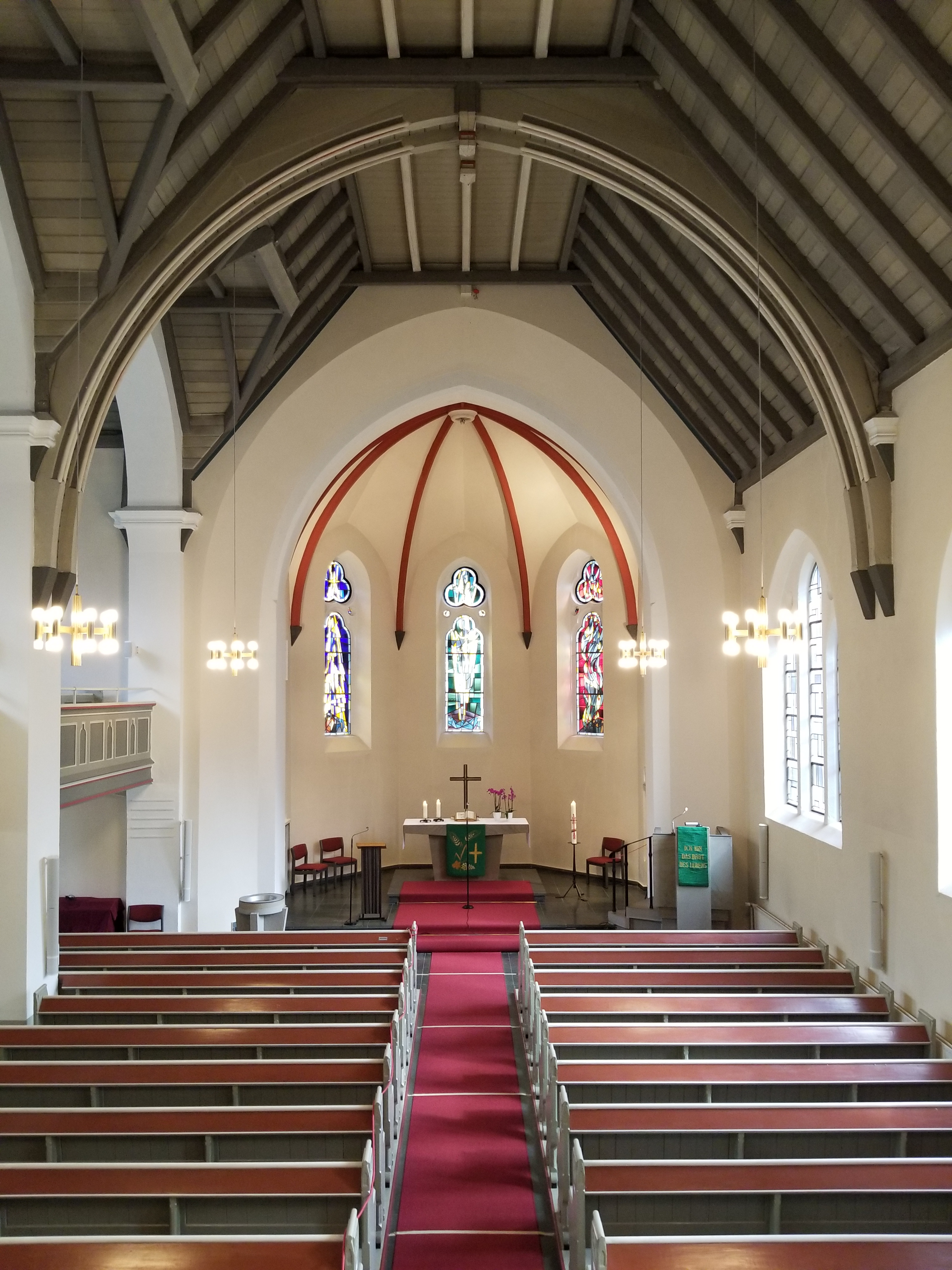 Altar, Kanzel, Chorraum und Holzdecke der evangelischen Kirche in Nachrodt, Blick von der Orgelempore